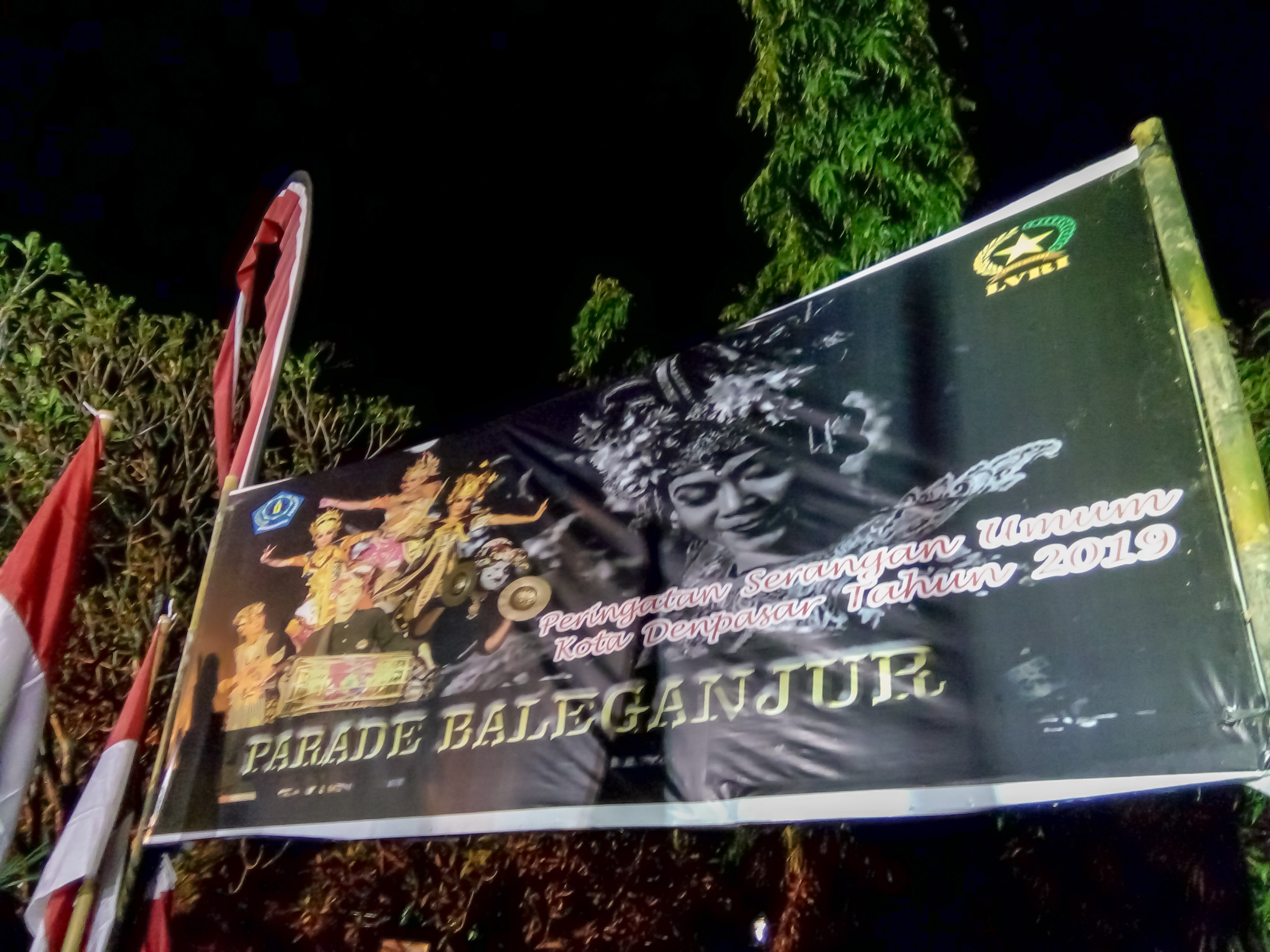 Baliho Parade Baleganjur di kota Denpasar, sabtu 13 April 2019